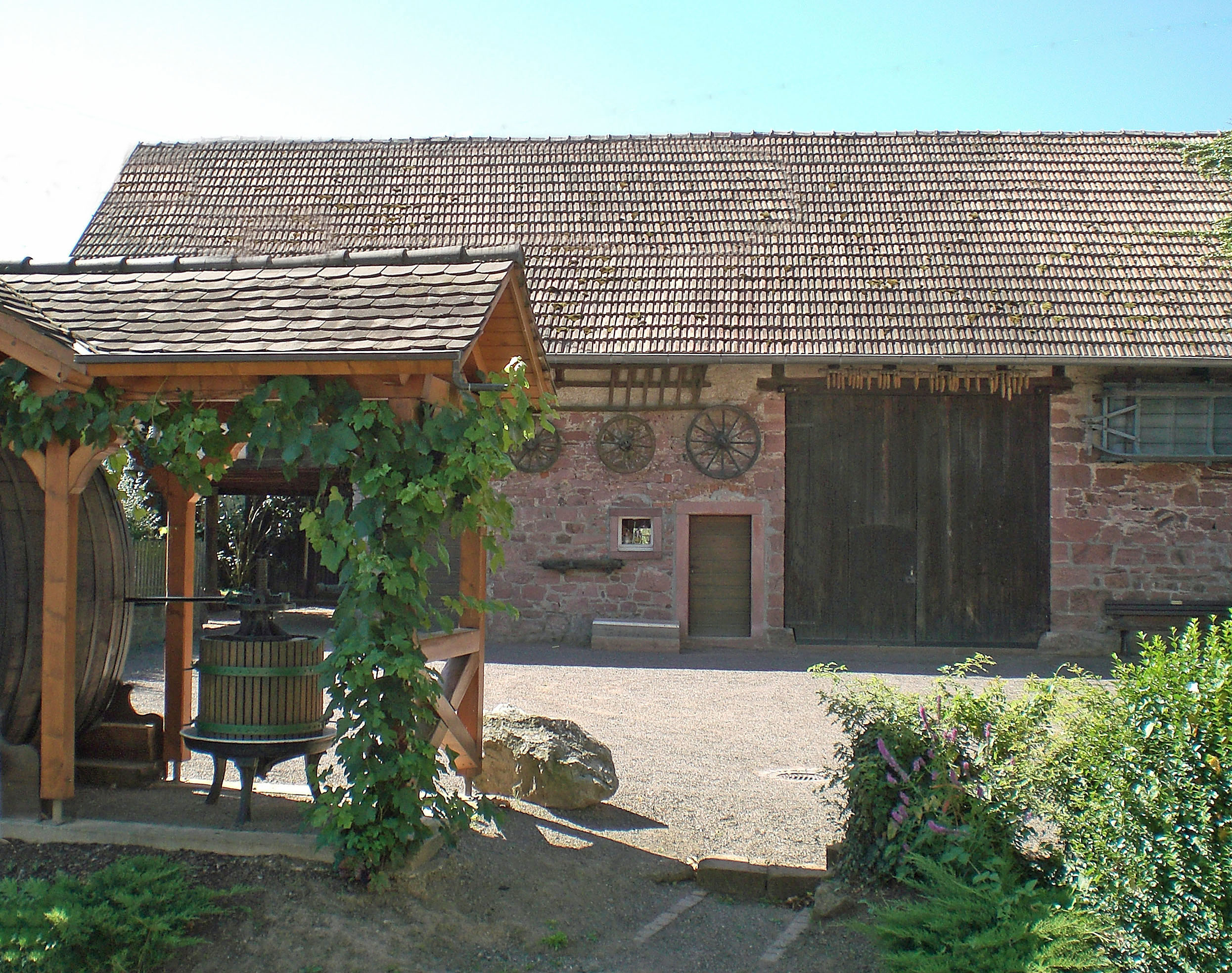 Denzlinger Heimathues. In dieser bäuerlichen Hofanlage mit Wohnhaus, Scheune, Stall und Keller hat der Heimatverein ein Museum eingerichtet, das die Lebens- und Arbeitsverhältnisse vergangener Zeiten zeigt.